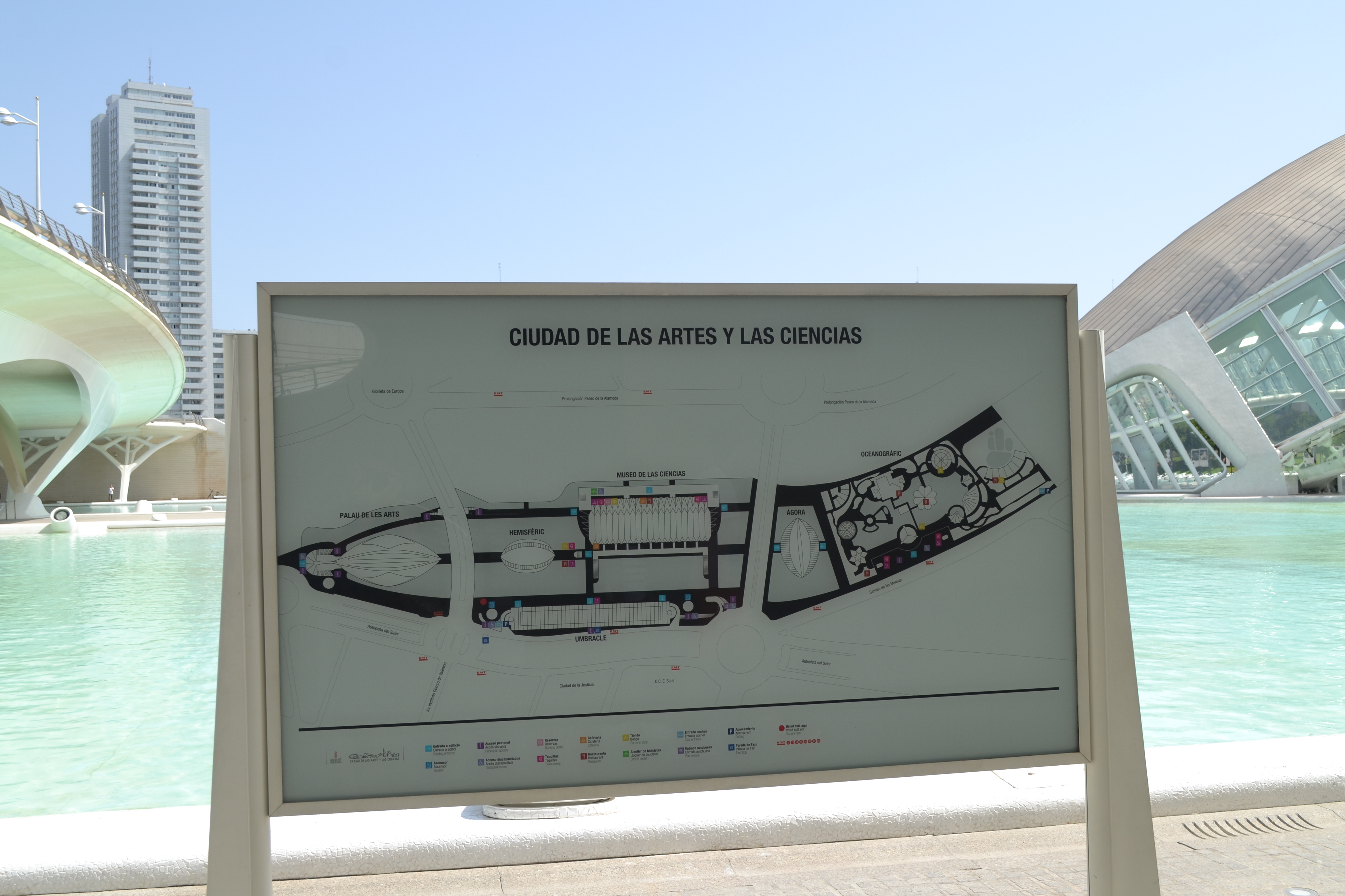 Ciudad de las Artes y las Ciencias